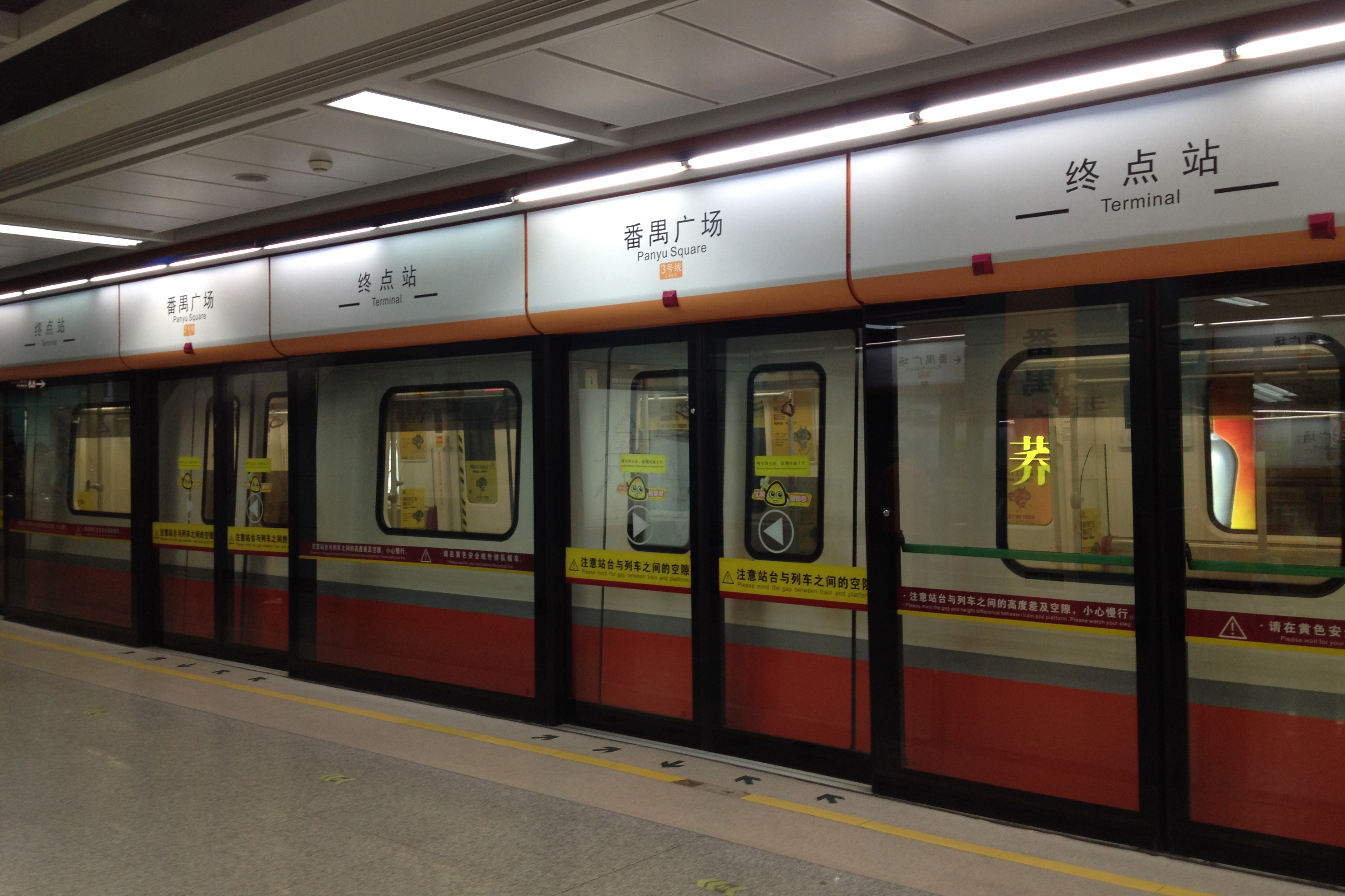 广州地铁番禺广场站落客月台